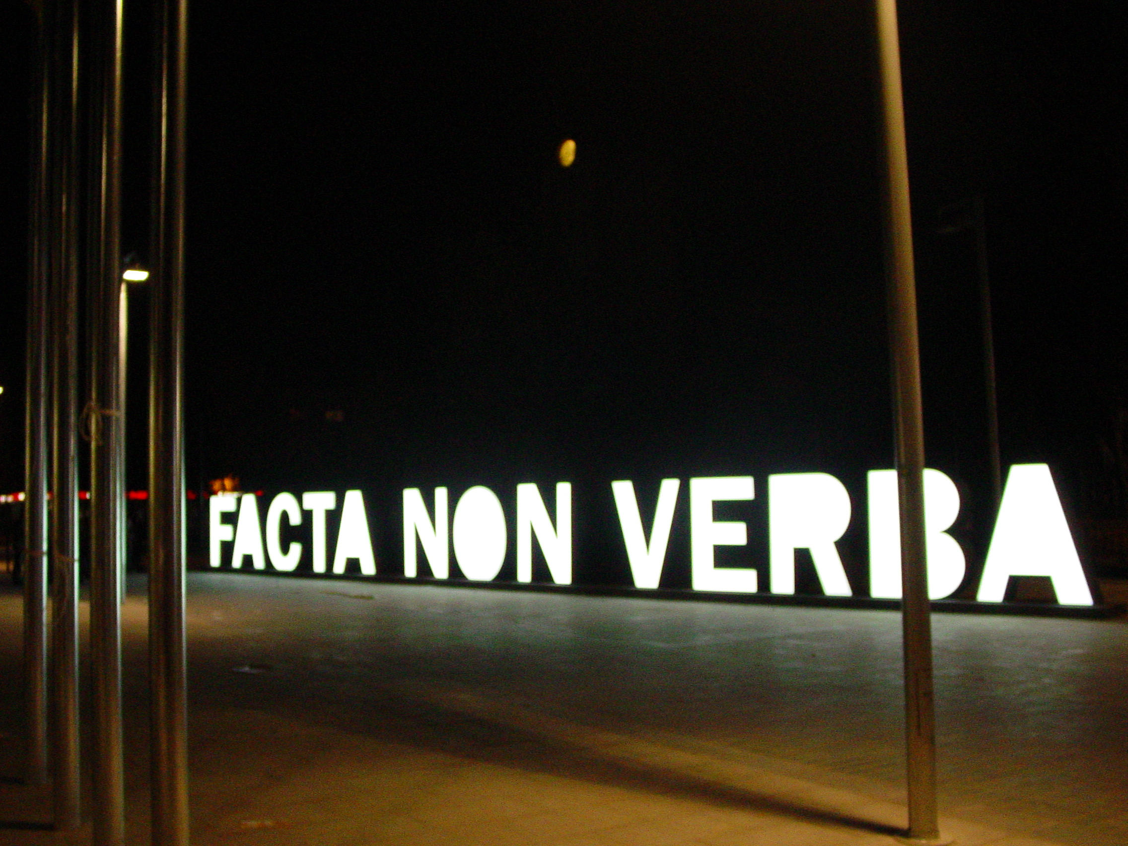 Facta non verba (Deeds not words) in Cerdanyola